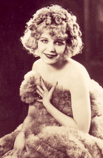 Singer/dancer Bee Palmer in fur